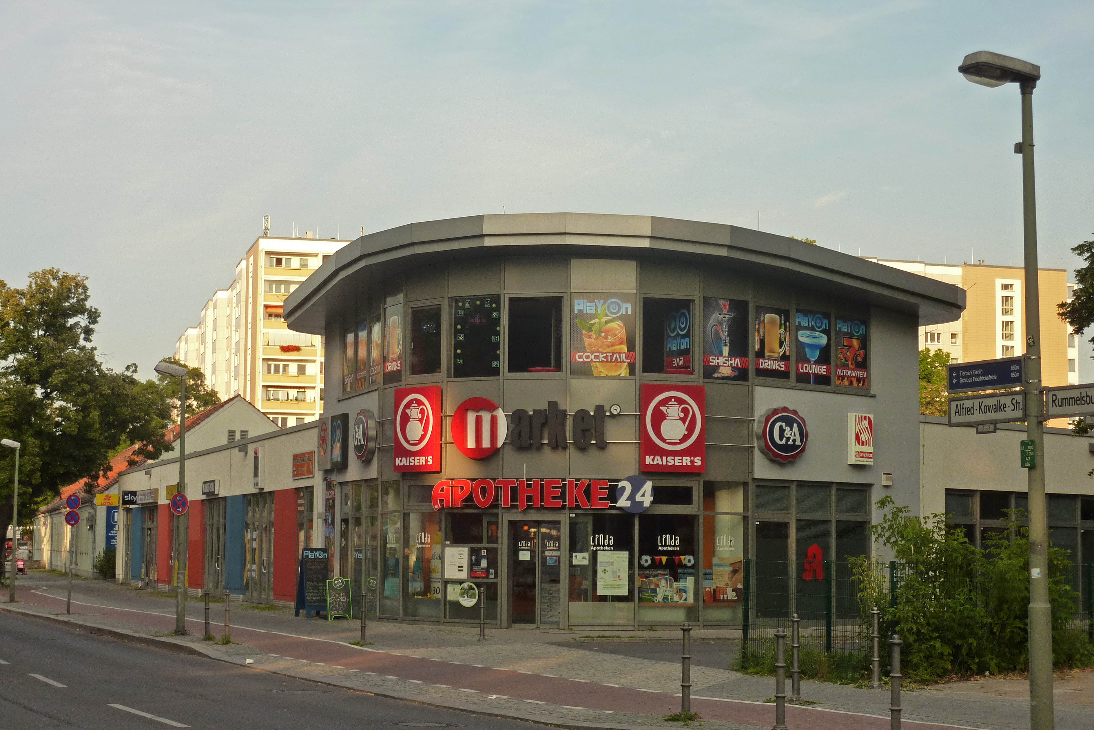 Gebäude Alfred-Kowalke-Straße 1 in Berlin-Friedrichsfelde.